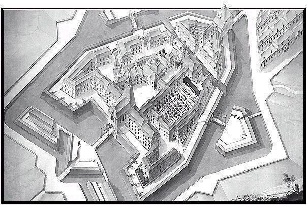 Аксонометрический план крепости Ингербург из фондов Государственного музея-заповедника «Гатчина»